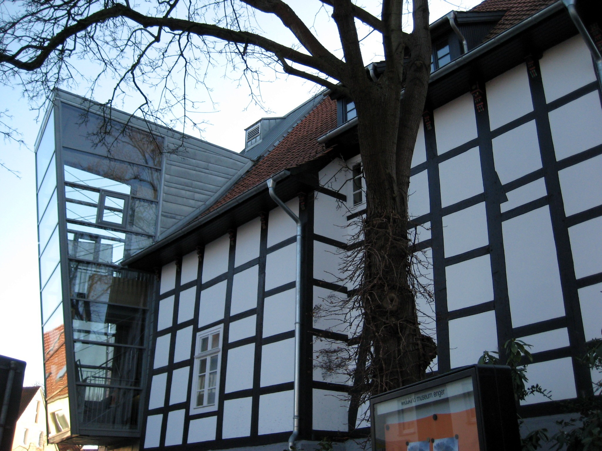 Museum EngerThis is a photograph of an architectural monument.